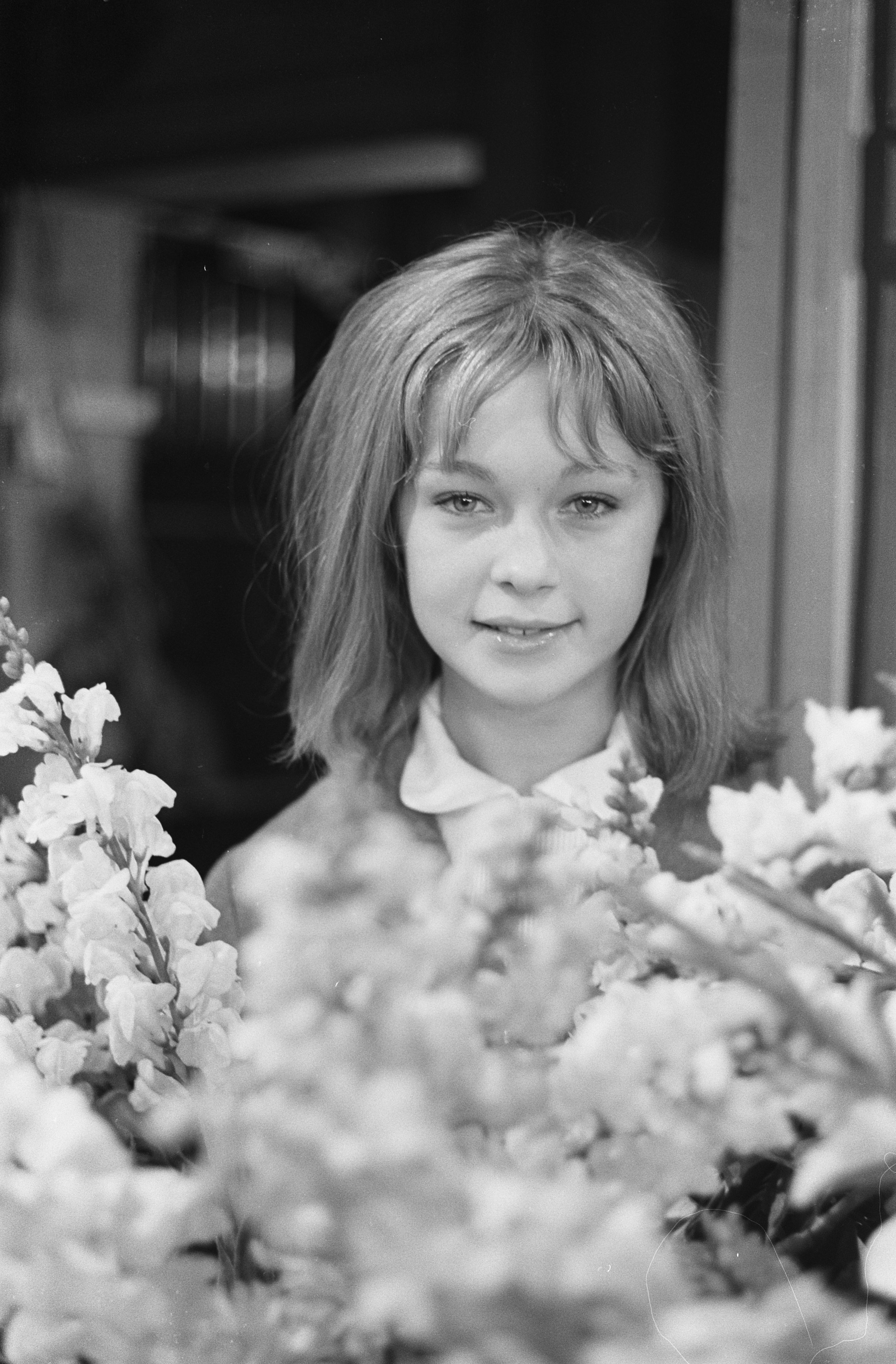 Collectie / Archief : Fotocollectie Anefo Reportage / Serie : [ onbekend ] Beschrijving : Rudy Carrellshow , het Spaanse filmsterretje Marisol (kop) Datum : 18 oktober 1962 Trefwoorden : portretten Persoonsnaam : marisol Fotograaf : Pot, Harry / Anefo Auteursrechthebbende : Nationaal Archief Materiaalsoort : Negatief (zwart/wit) Nummer archiefinventaris : bekijk toegang 2.24.01.05 Bestanddeelnummer : 914-4259 Reacties Geplaatst door Maaike op 07 mei 2014 - 11:30. Spaans filmsterretje Marisol, geboren in 1949 als Josefa Flores Gonzalez